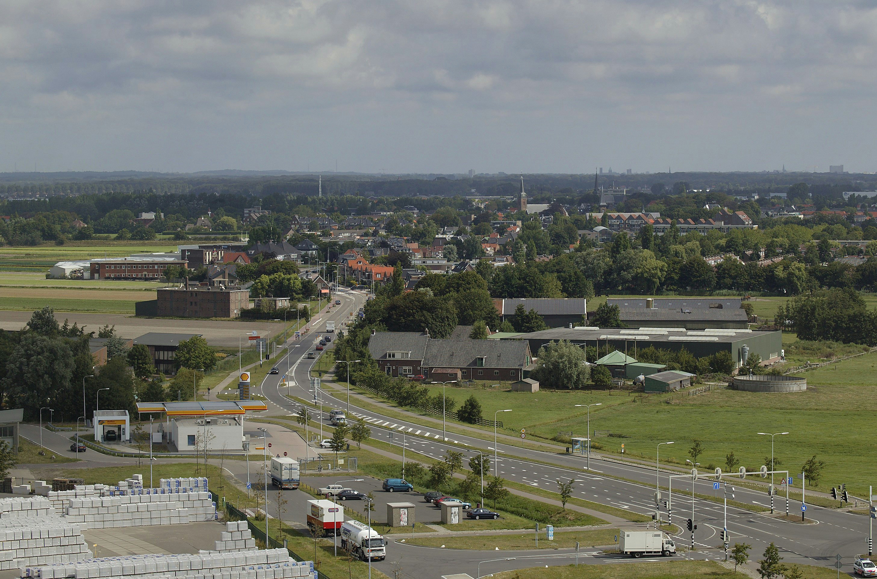 Cultuurlandschap: Overzicht vanaf de watertoren